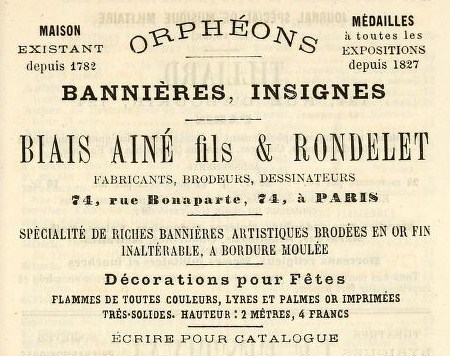 Publicité de matériels pour orphéons.